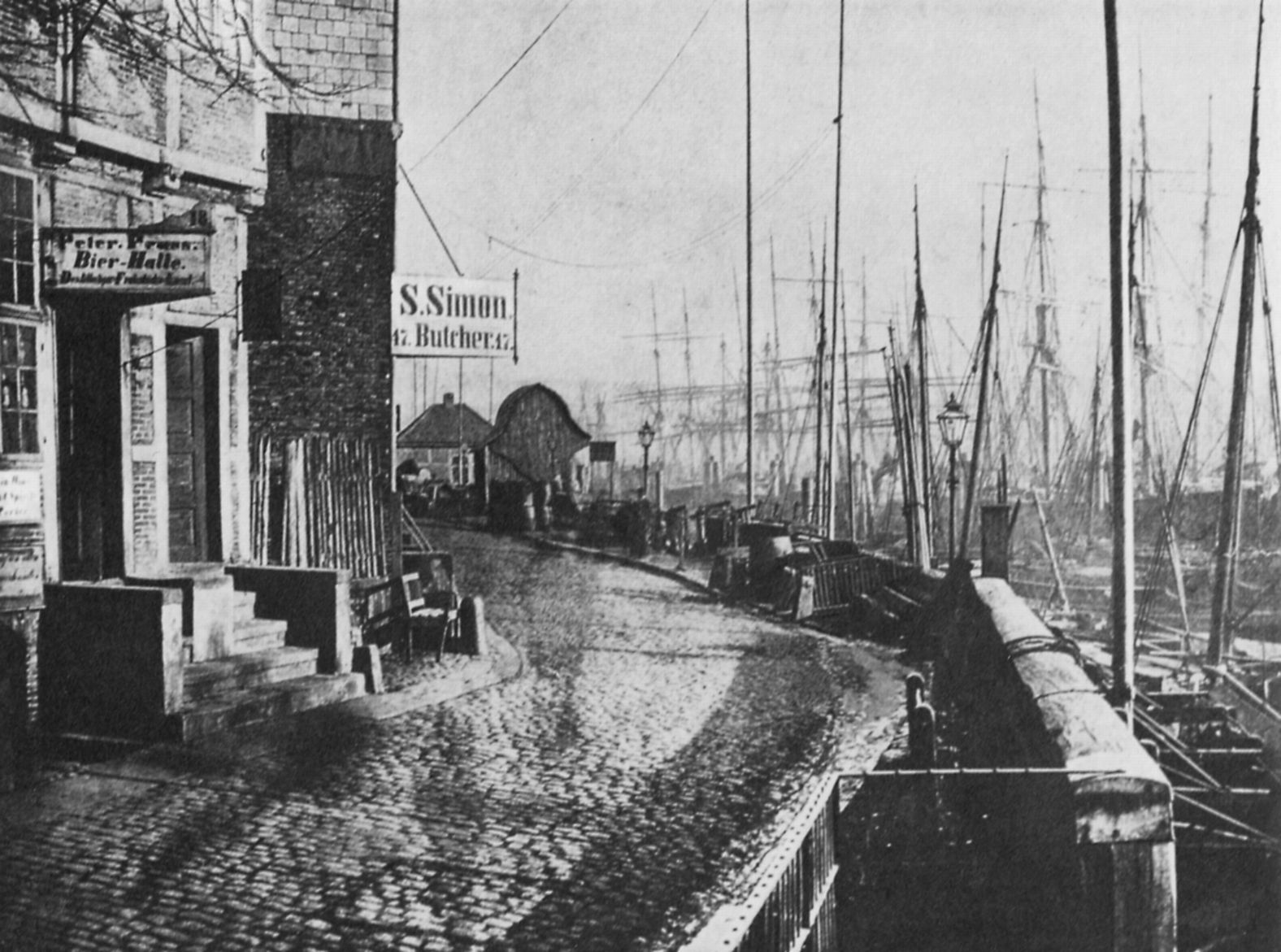 Originale Bildunterschrift: Die Straße »Bei den Vorsetzen« in Hamburg